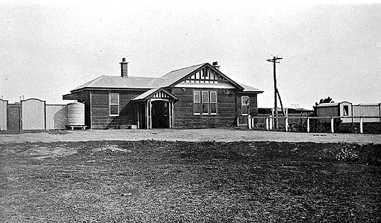 Sea Lake Station, circa 1920